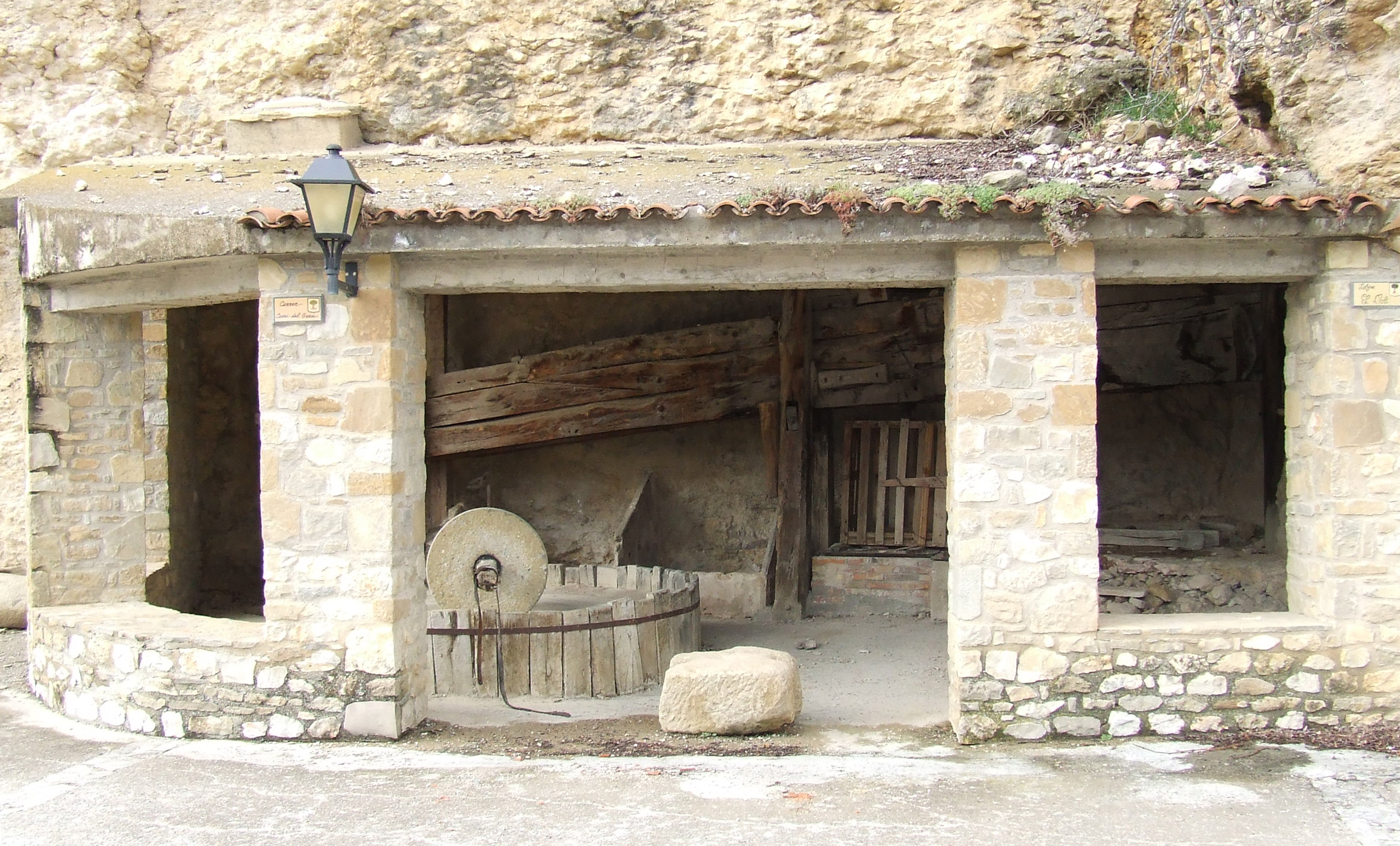 Molí de l'Alzina (Sant Esteve de la Sarga, Pallars Jussà)